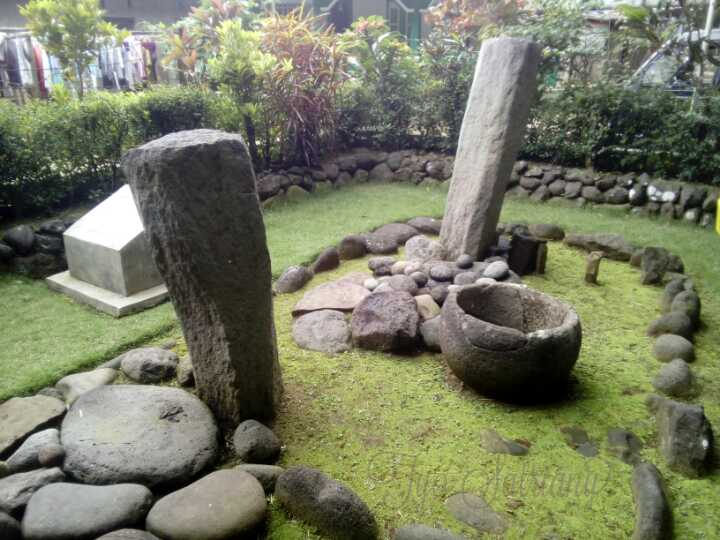 peninggalan Purbakala di Banyumas.